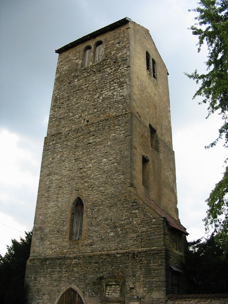 Tour de l'ancienne église Saint-Pierre à Gerbéviller (Meurthe-et-Moselle)